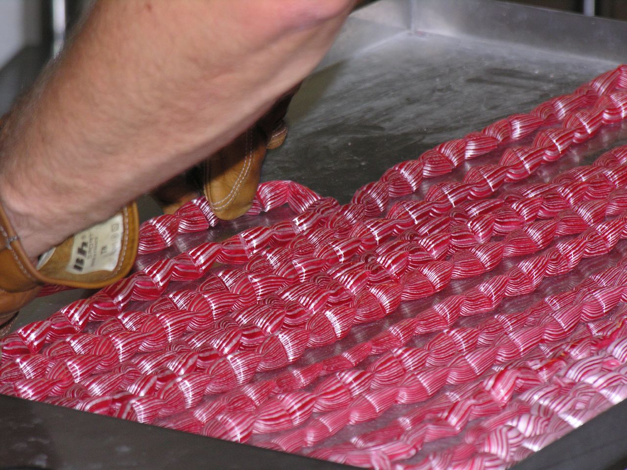 Découpe des berlingots de Carpentras